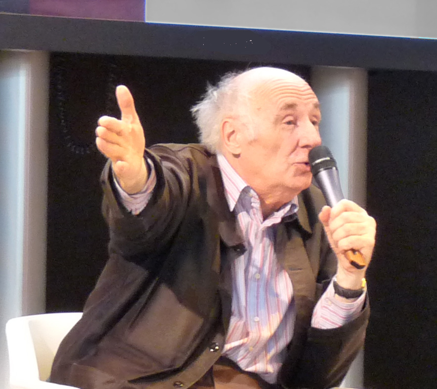 Jacques Roubaud au Salon du Livre de Paris